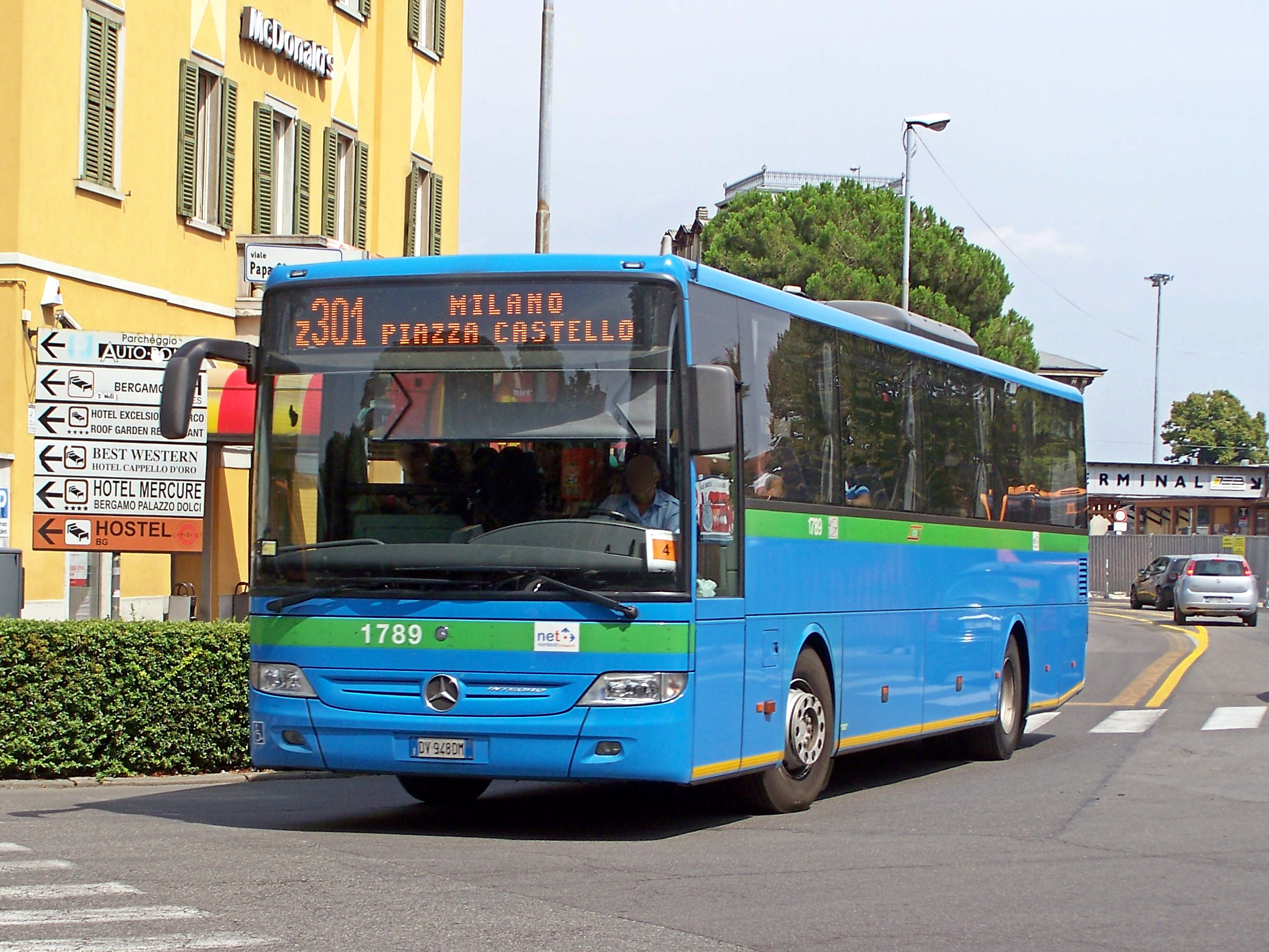 Il Mercedes Integro nr. 1789 della Nord Est Trasporti (NET) in piazzale Marconi di Bergamo, dopo essere uscito dall'autostazione cittadino, mentre espleta servizio sulla z301 in direzione di Milano piazza Castello